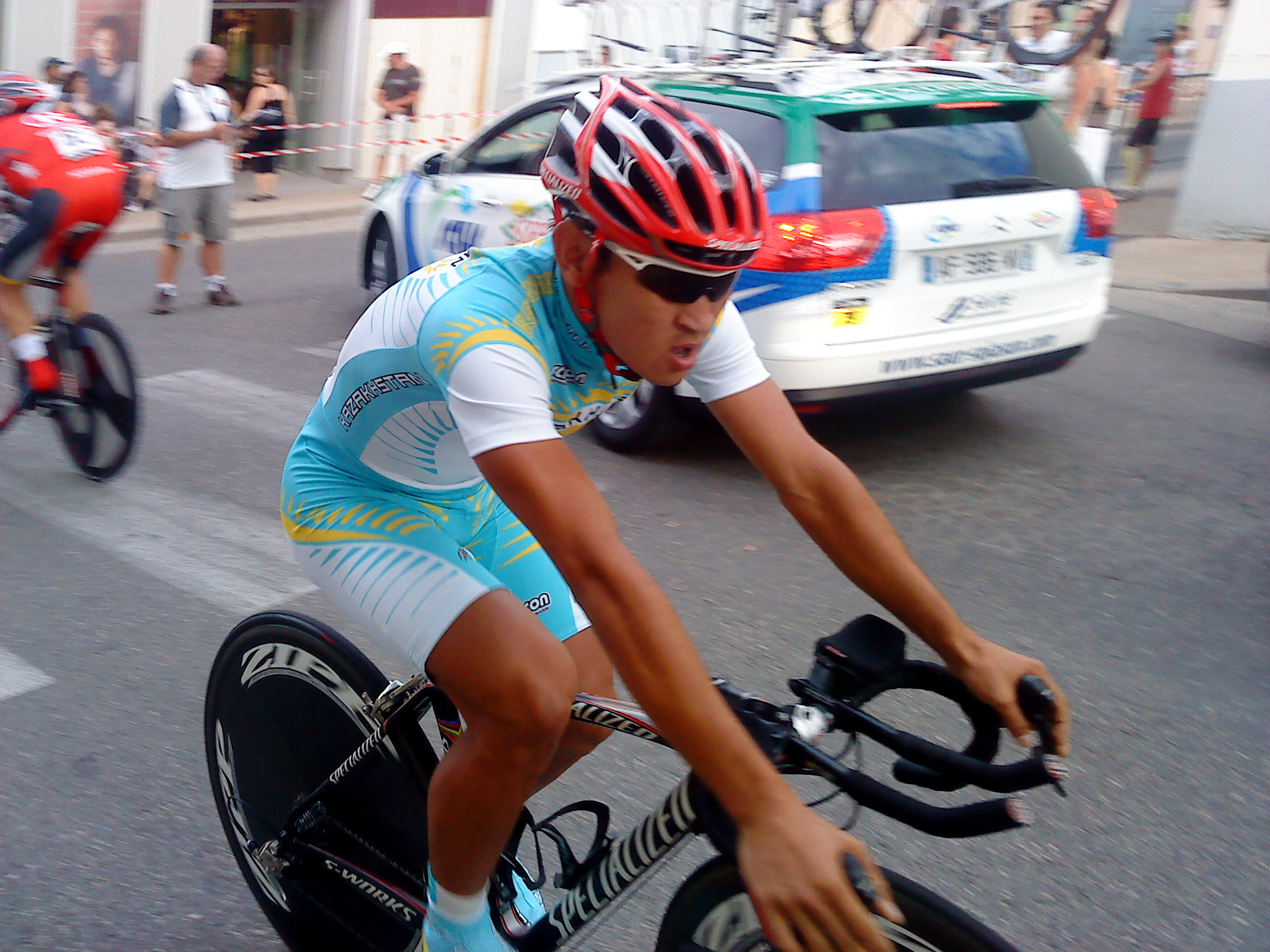 Alexandr Dymovskikh à l'arrivée du prologue du Tour de l'Ain 2010